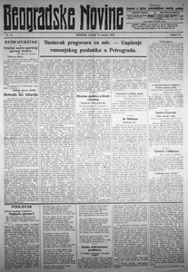 Српски (ћирилица): Београдске новине